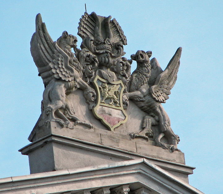 Beschreibung: Große Stadtschule in Rostock / Germany Fotograf: Darkone, 17. August 2005